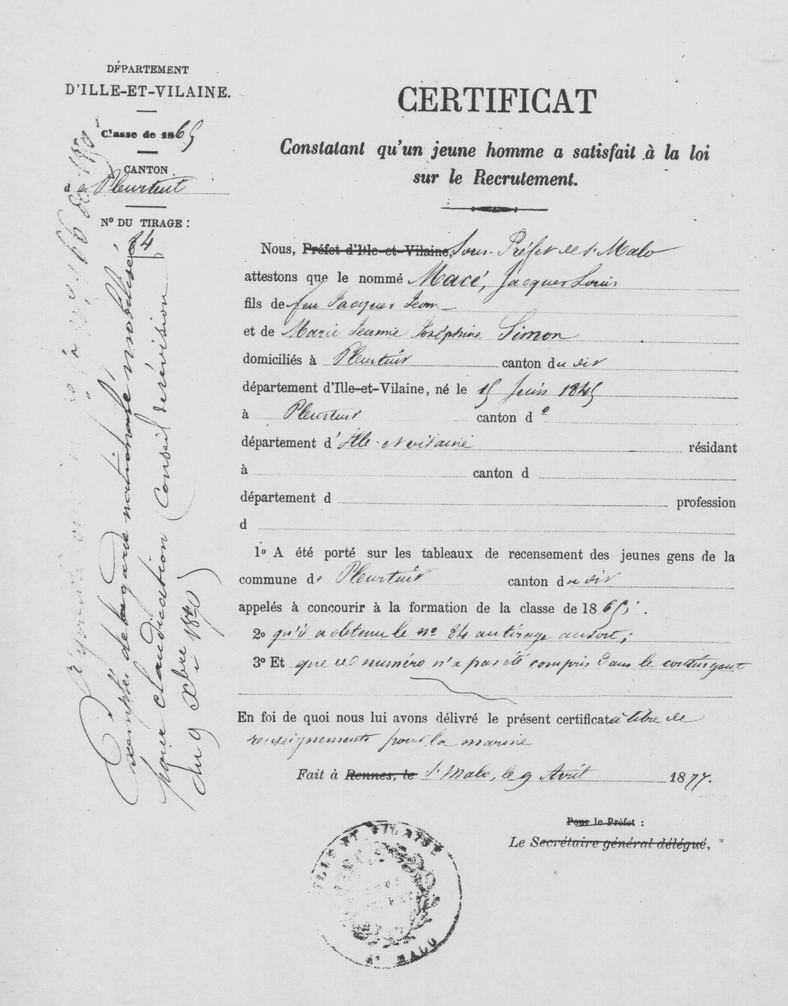 Certificat constatant qu'un jeune homme a participé au tirage au sort afin de former le contingent de l'armée française pour la classe de 1865, délivré par le sous-préfet de Saint-Malo le 9 avril 1877.